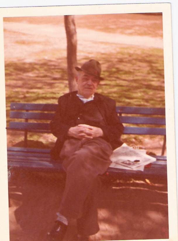 יצחק אבינרי , גבעתיים